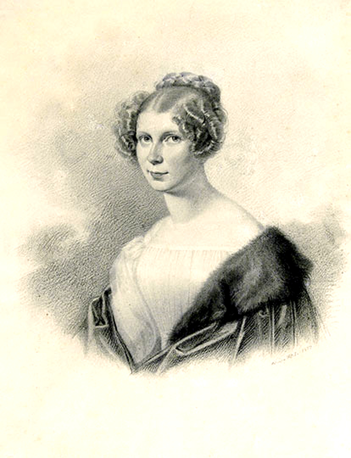 Gróf széki Teleki Blanka (Kővárhosszúfalu, 1806. július 3. – Párizs, 1862. október 23.) a magyar nőnevelés egyik úttörője, a nők művelődési egyenjogúságának híve.